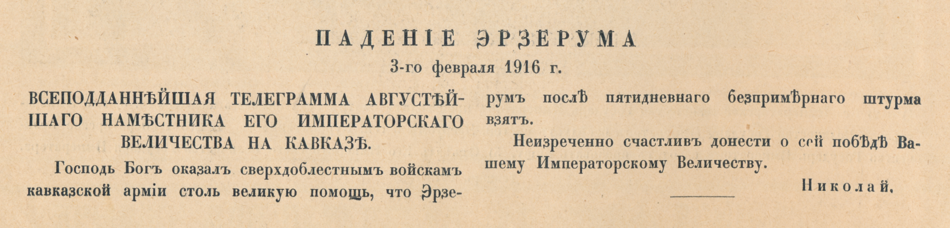 Телеграмма великого князя Николая Николаевича (Младшего) императору Николаю II о падении Эрзерума.